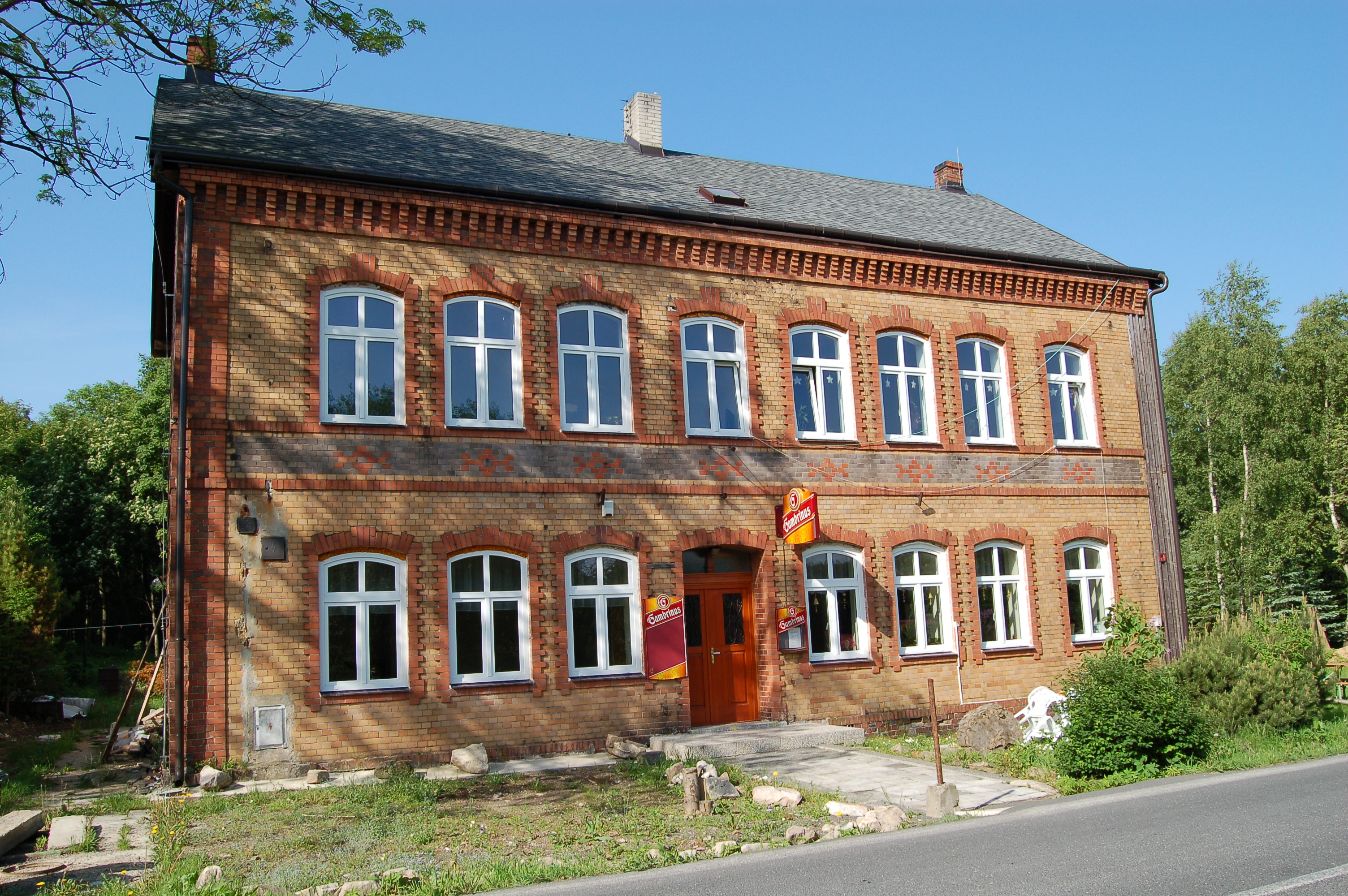 Obec Klíny v okrese Most.